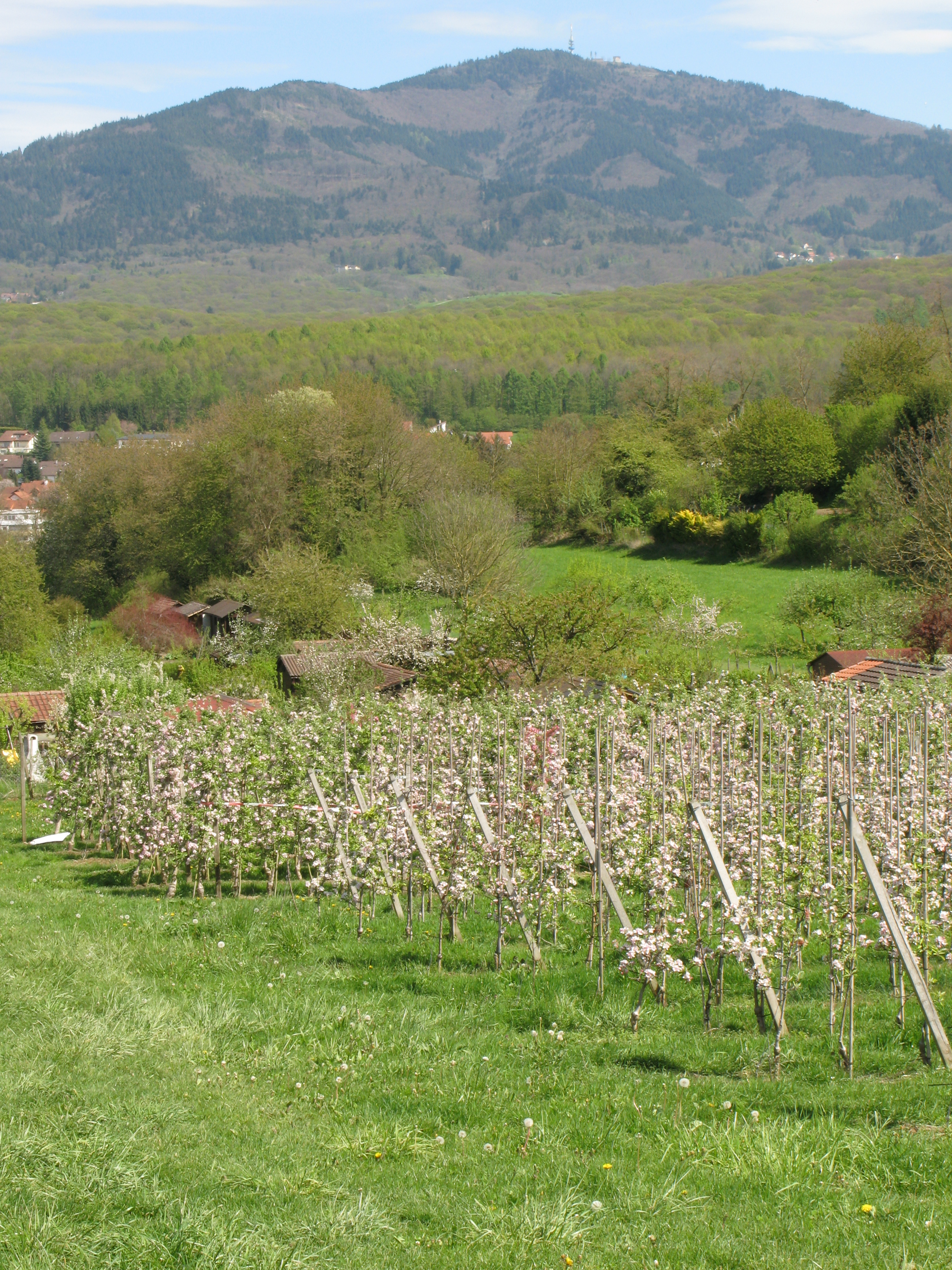 Blick auf den Hochblauen am Luginsland bei Müllheim am Fernwanderweg Markgräfler Wiiwegli im Markgräflerland.